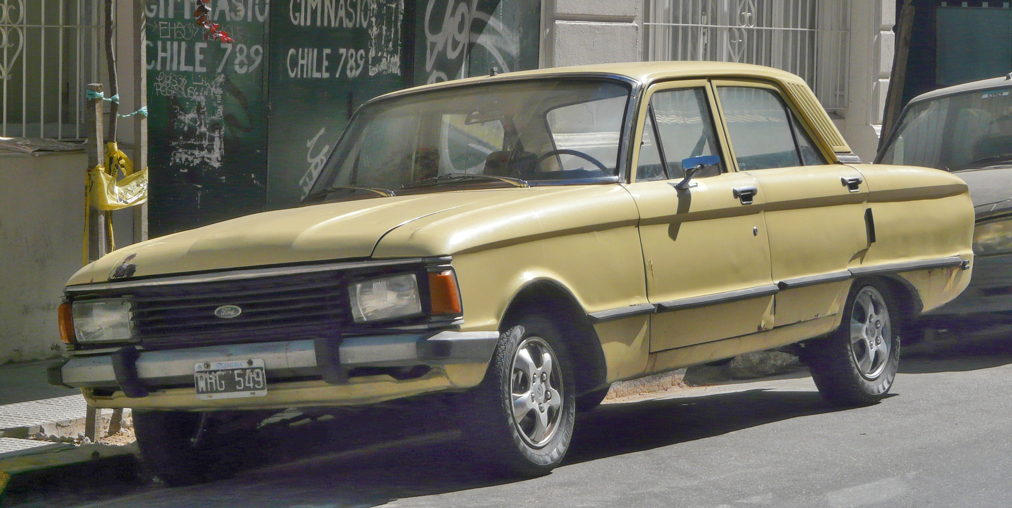 Ford Falcon (Argentinian 1982-1991 model), Buenos Aires, Argentina, November 2008.